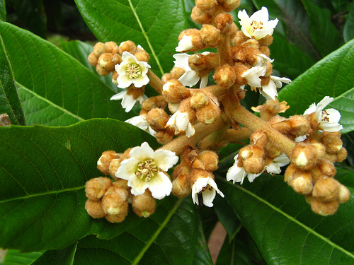 nespera chinesa